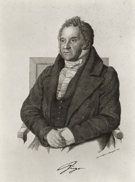 Summary am 16.03.2006 von Benutzer:Wladyslaw Sojka hochgeladen Quelle: Beschreibung: Der Stich zeigt Gustav von Hugo und wurde nach einer Zeichnung von Sophie von Schmerfeld mit faksimilierter Unterschrift Hugos angefertigt.